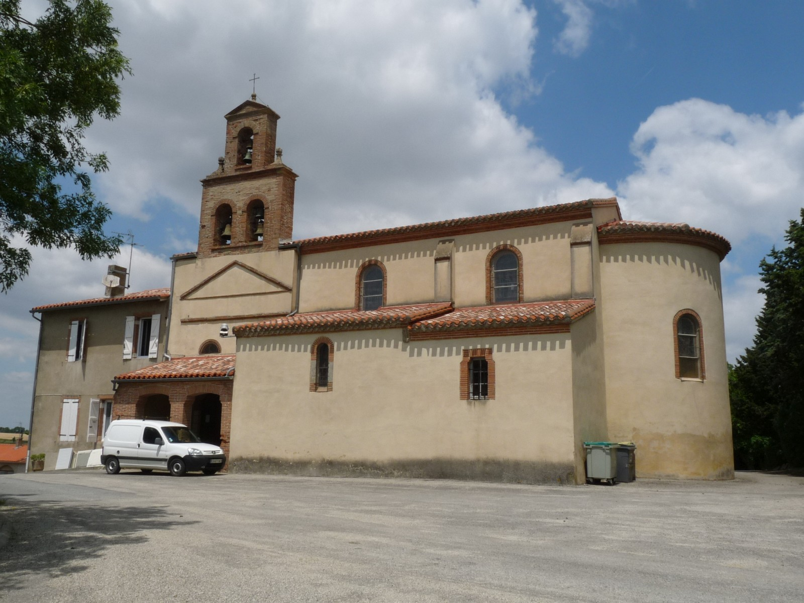 Eglise de Toutens, Haute-Garonne, France